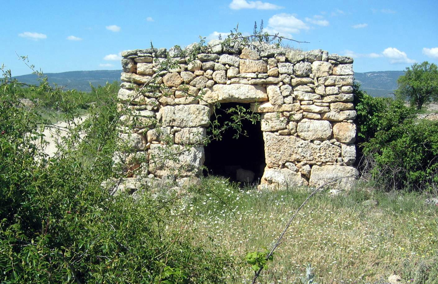 Vista frontal de la barraca de Josezón, Vallanca (Valencia).